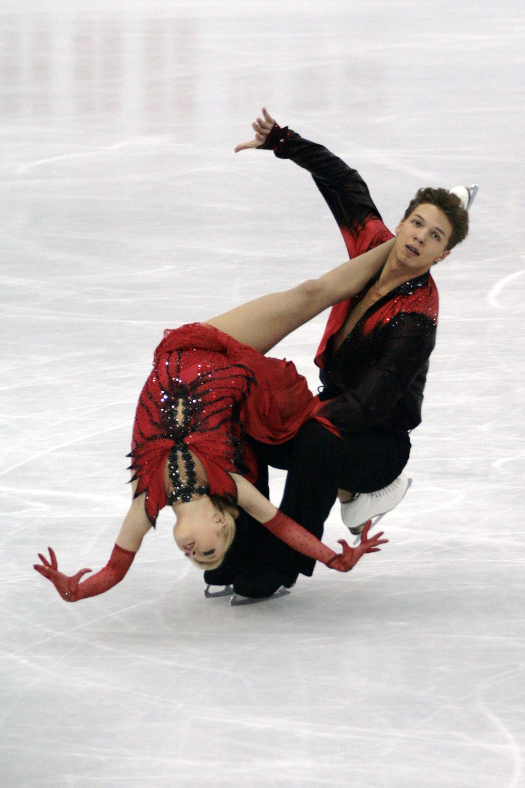 Екатерина Боброва и Дмитрий Соловьев (Россия) на чемпионате мира по фигурному катанию 2012